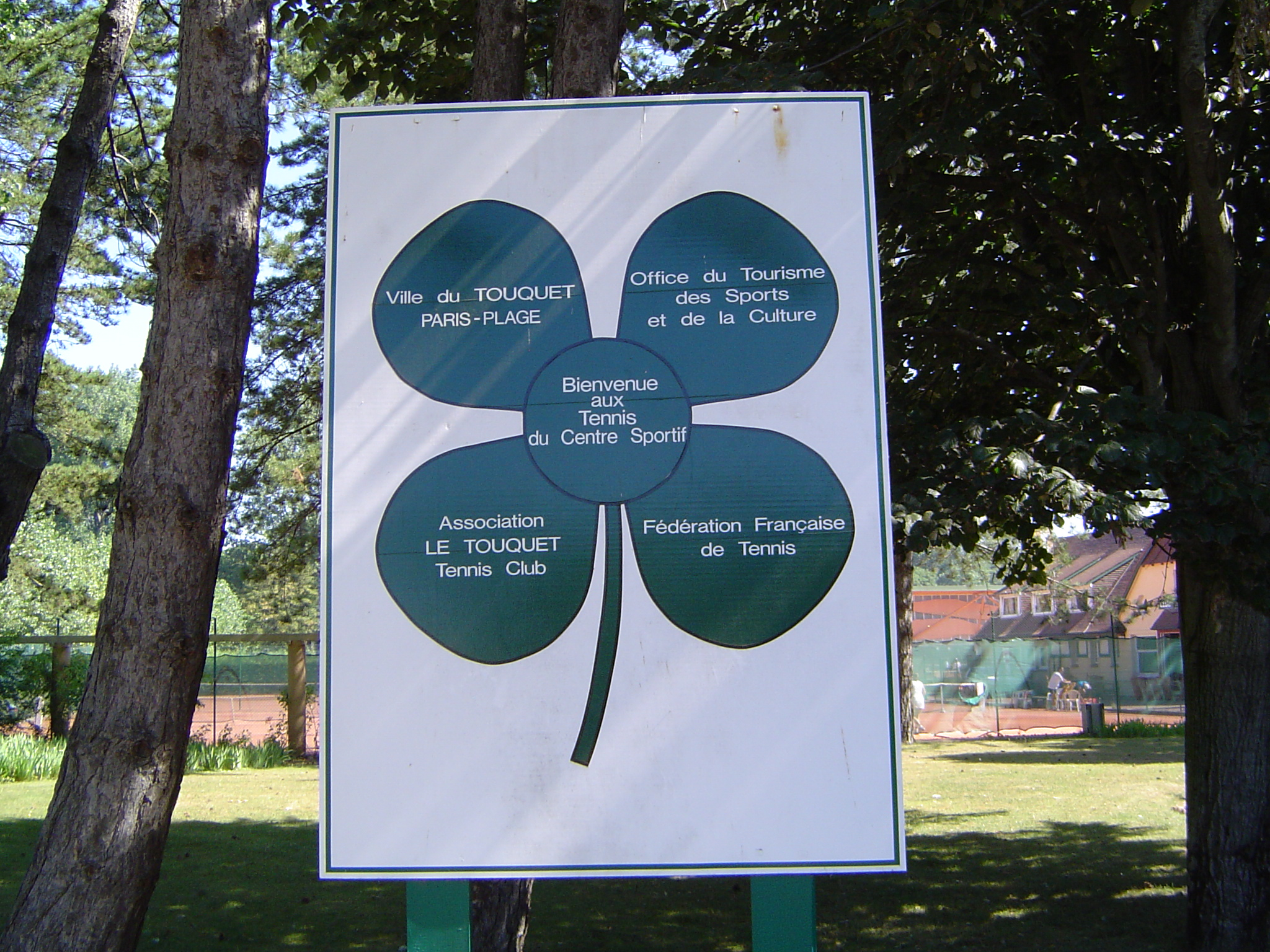 Photos prises dans la commune du Touquet-Paris-Plage